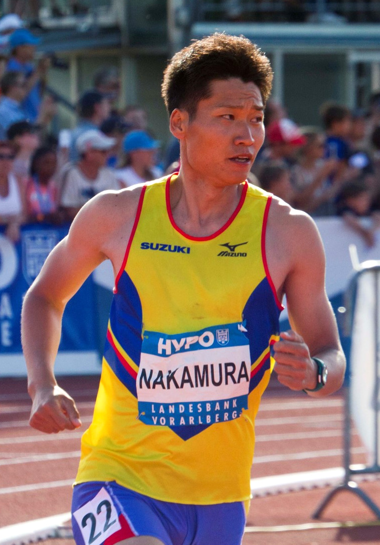 546 nakamura 1500m